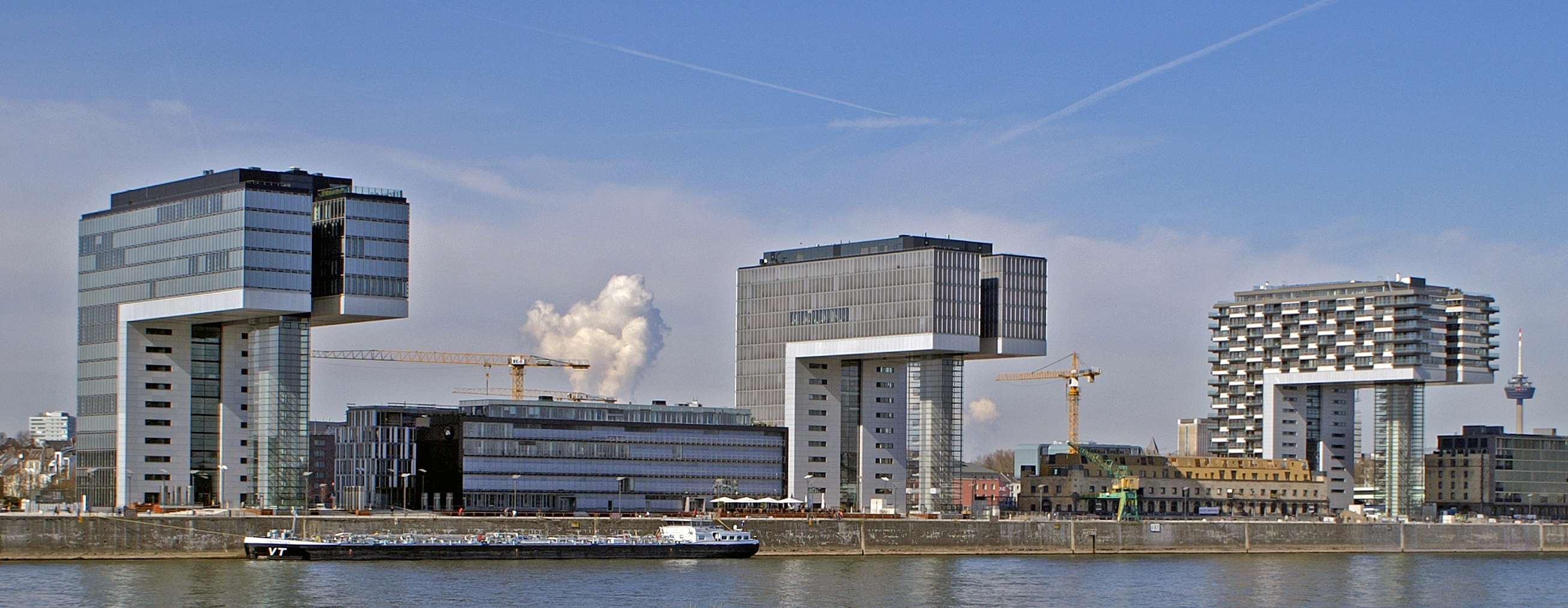 Rheinansicht der Kranhäuser im Rheinauhafen Köln im März 2011.